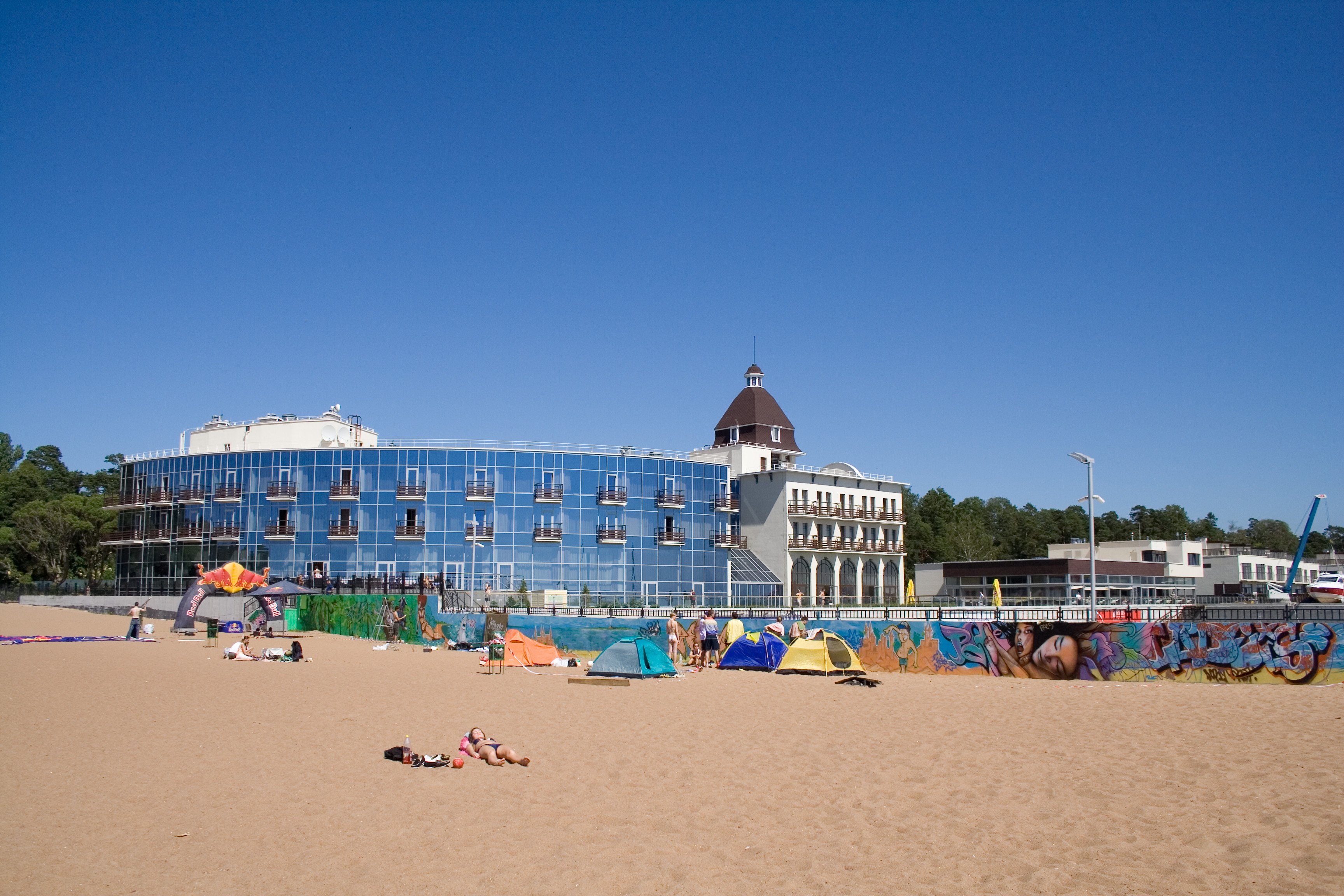 Вид на отель "Терийоки" со стороны Зеленогорского пляжа